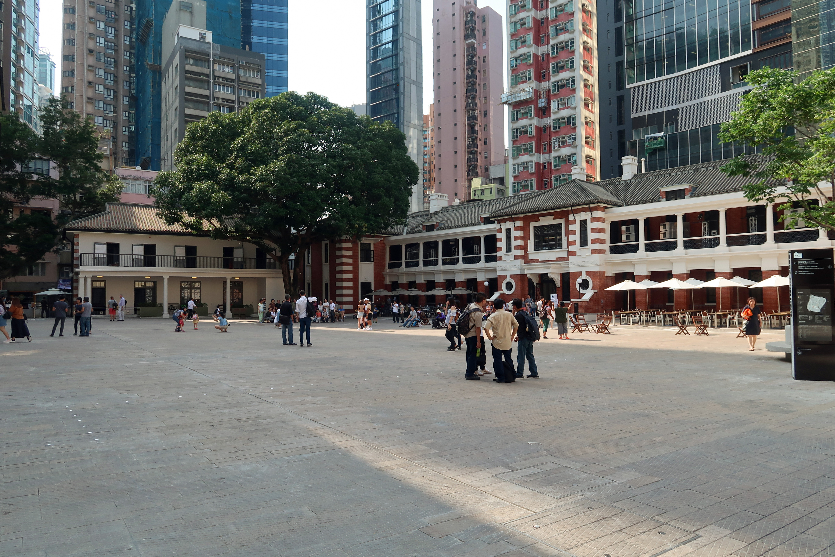 Tai Kwun Parade Ground